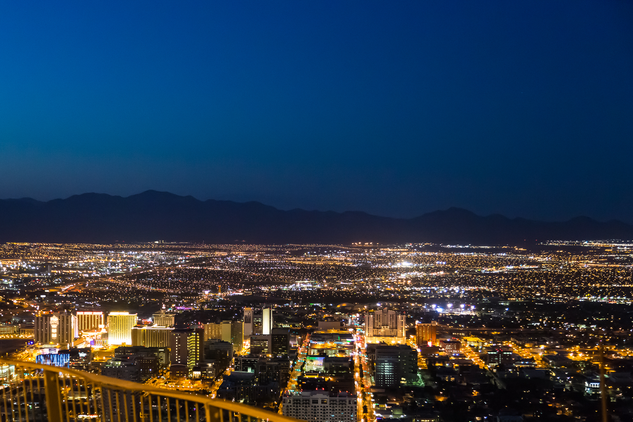 Las Vegas at night